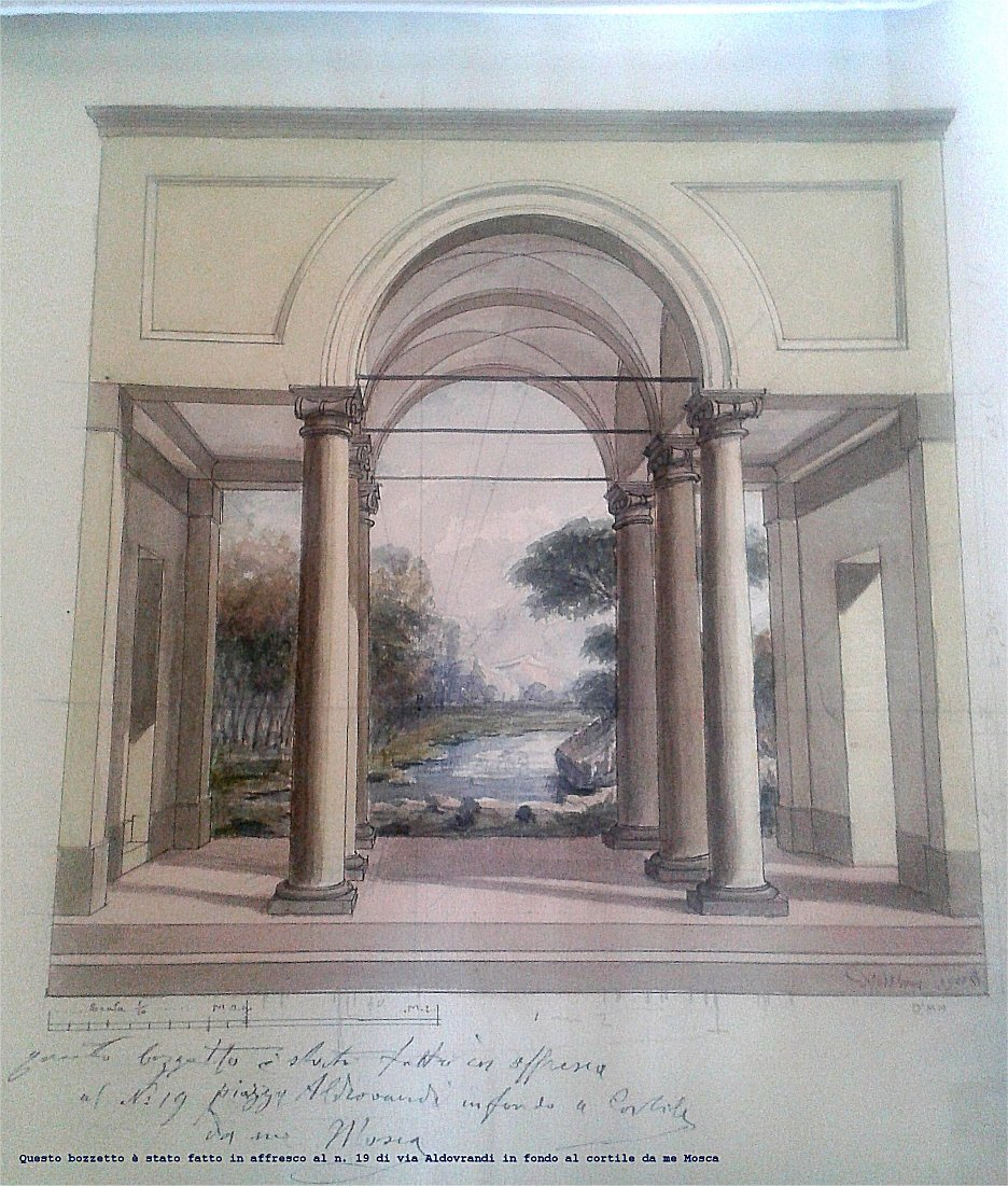 bozzetto dell'affresco realizzato in via Aldovrandi 19, in fondo al cortile, a Bologna da Antonio Mosca con data e firma autografa